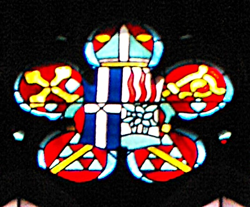 Wappenfenster des Speyerer Bischofs Konrad von Busch, im Chor der Stiftskirche Neustadt an der Weinstraße